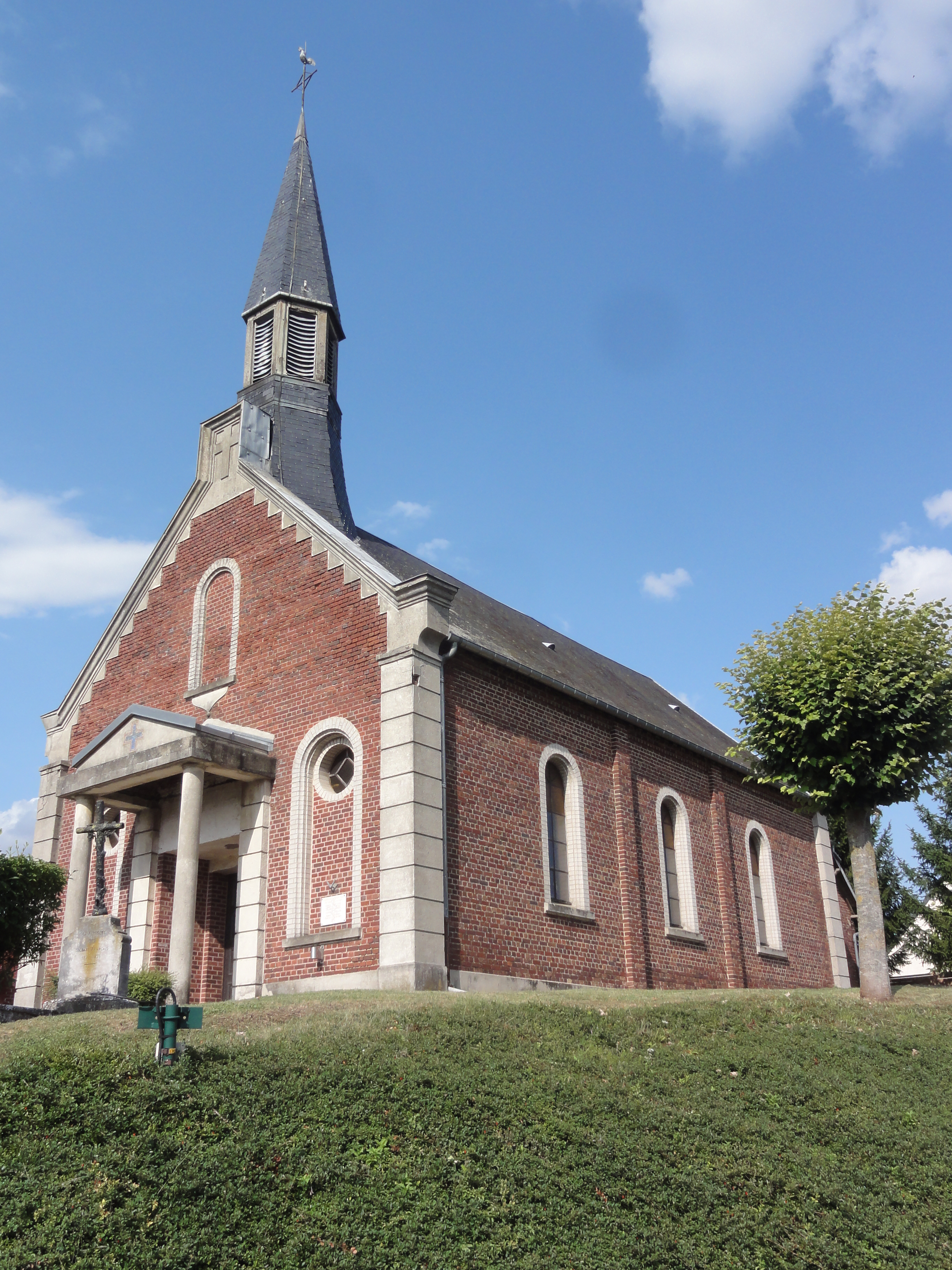 Castres (Aisne) église Saint-Quentin